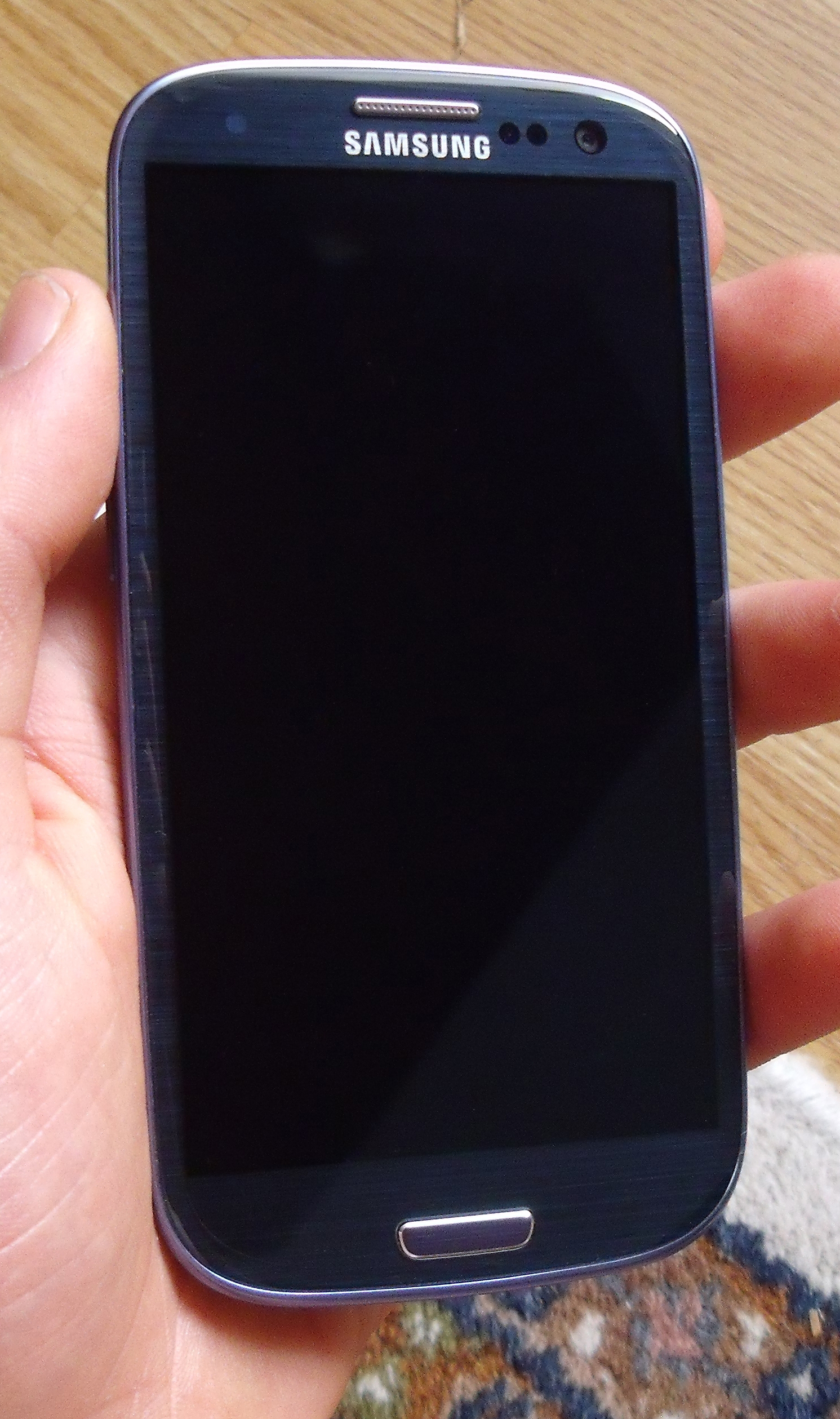 Samsung Galaxy S3 (GT-I9300) mit 16GB internen Speicher in der Farbvariante "Pebble Blue" (Kieselblau)